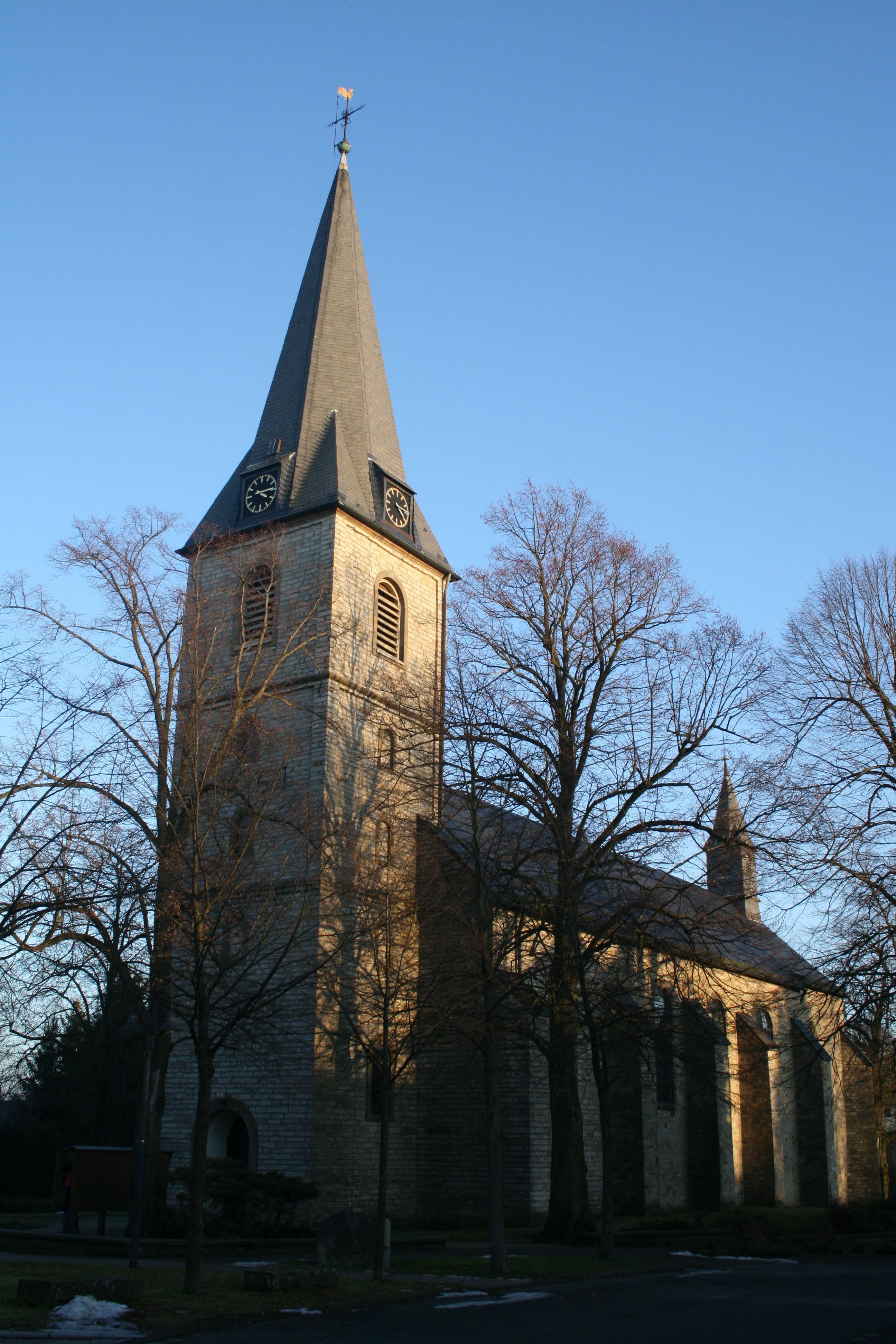 Bild der Haarener Kirche St. Vitus